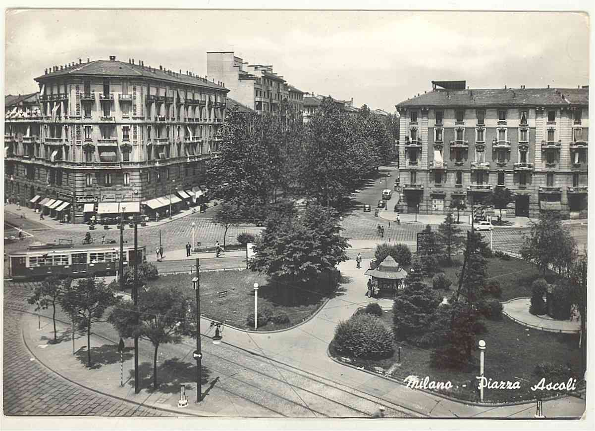 MI Milano piazza Ascoli